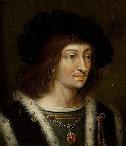 Détail d'un portrait de Jean II et de son épouse. Musée des Offices, Florence (Inv. 1890, 641)